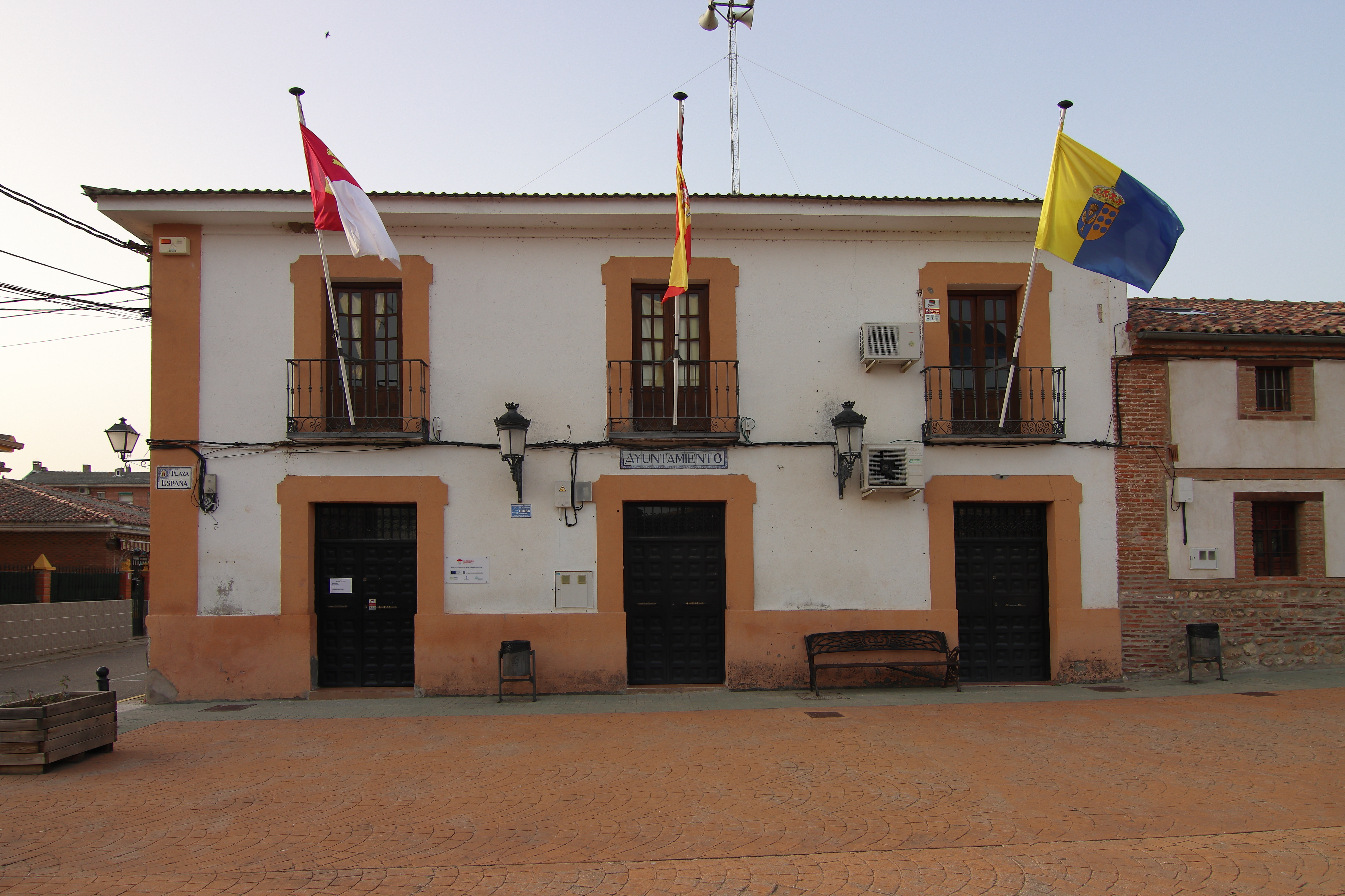 Ayuntamiento de Cardiel de los Montes